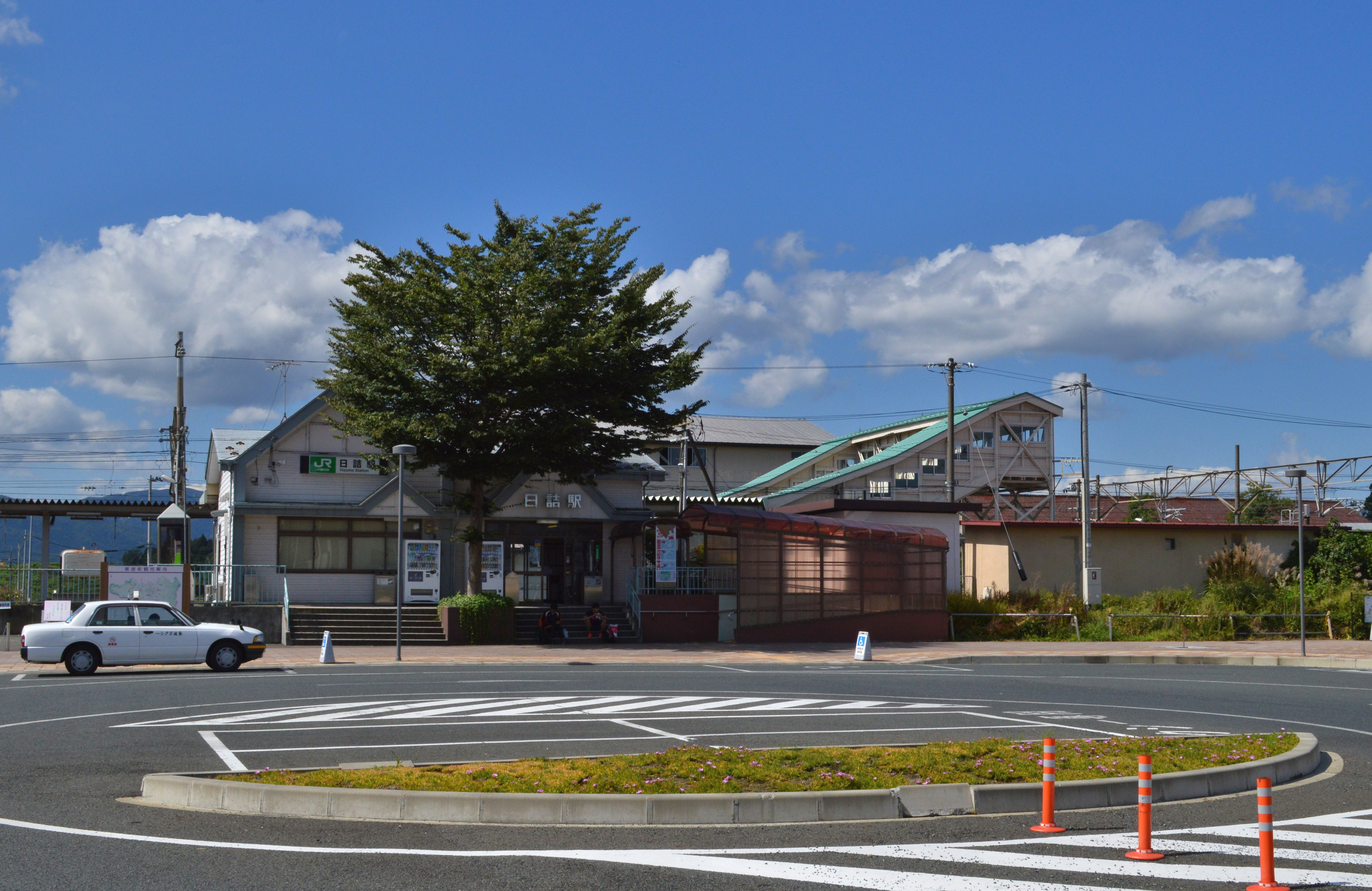 日詰駅 駅舎